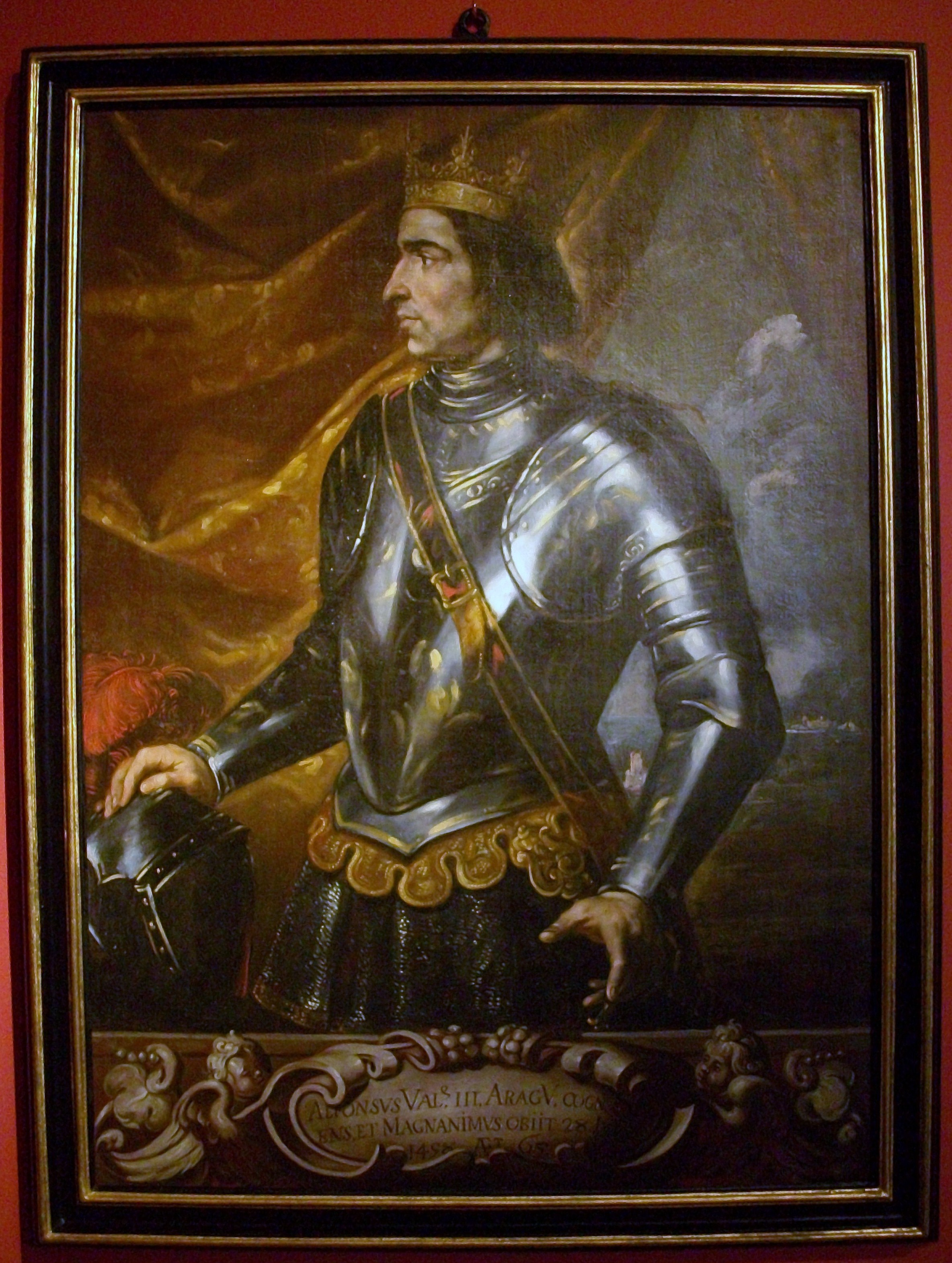 Retrat d'Alfons el Magnànim a la sala dels reis, Palau de la Generalitat Valenciana.